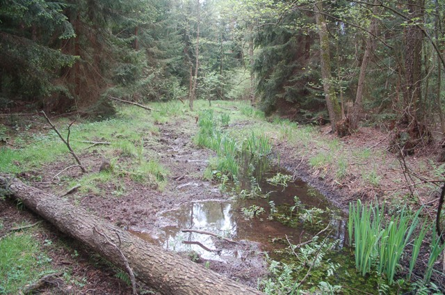 Źródlisko w Puszczy Wiechlickiej, Bory Dolnośląskie